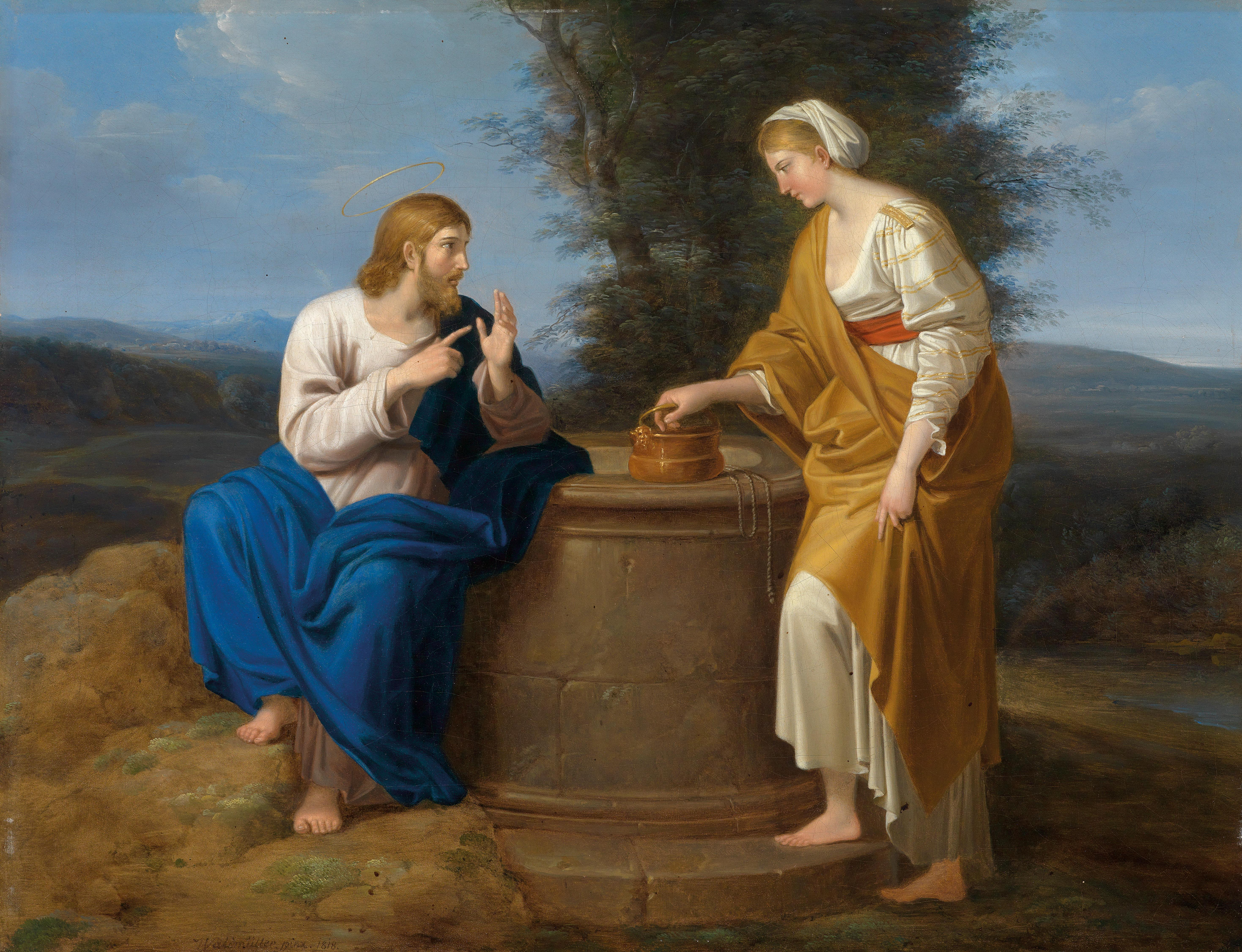 a partial copy after Annibale Caracci